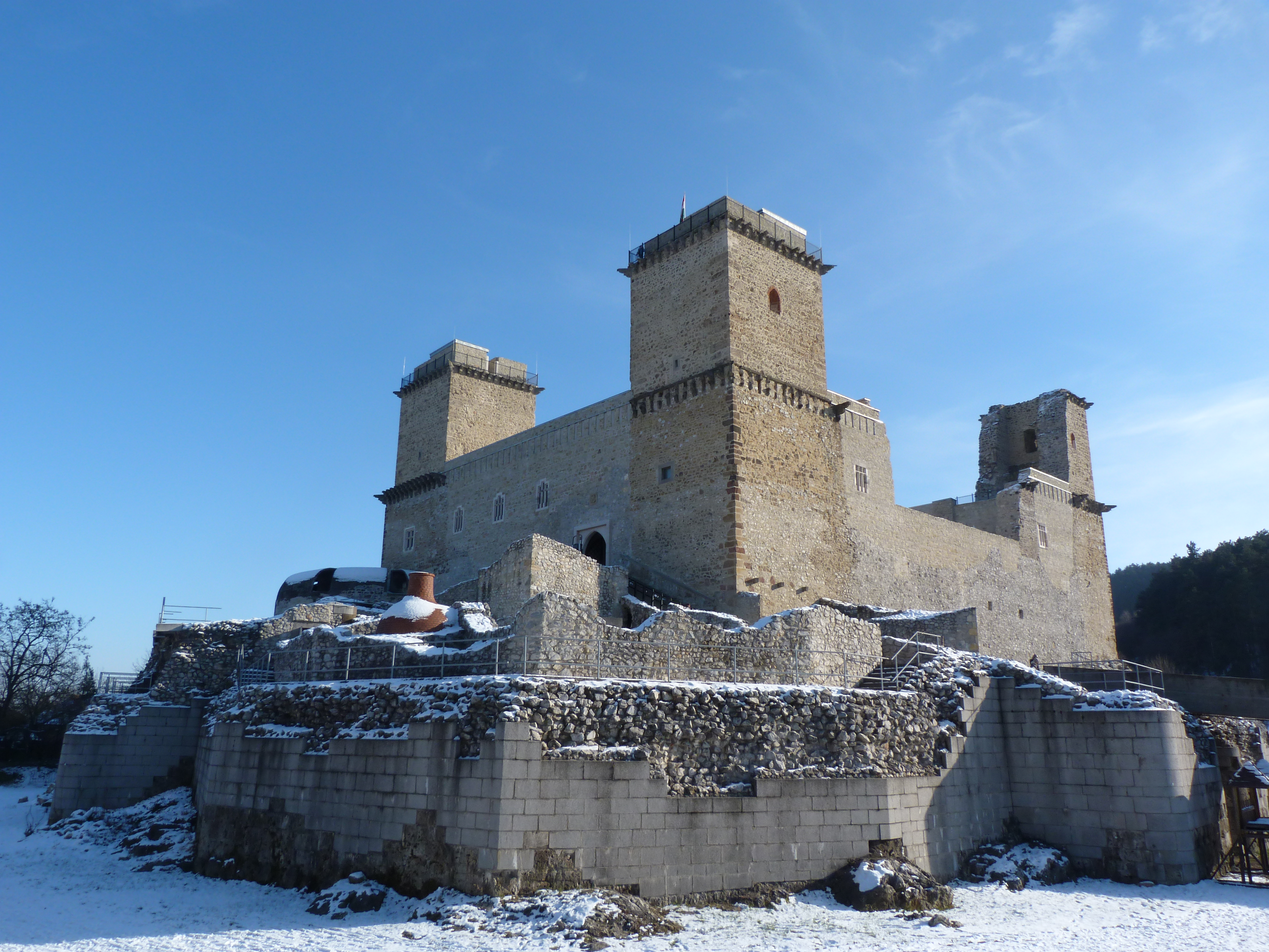 A felvétel 2015. február 7-én szombaton készült Diósgyőr Várában. ©© Derzsi Elekes Andor, Budapest, 2015, A fénykép másolását és felhasználását a szerző ellenérték nélkül, jogutódjaira is kihatóan megengedi. Az engedély kiterjed a kereskedelmi célú hasznosításra is. Kéri azonban nevének feltüntetését a felhasználás során. A Metapolisz sorozat valamennyi képe és filmje Creative Commons alatti valamint kereskedelmi - for profit - célra is felhasználható. Ajánlott hivatkozás: Derzsi Elekes Andor: Metapolisz DVD line